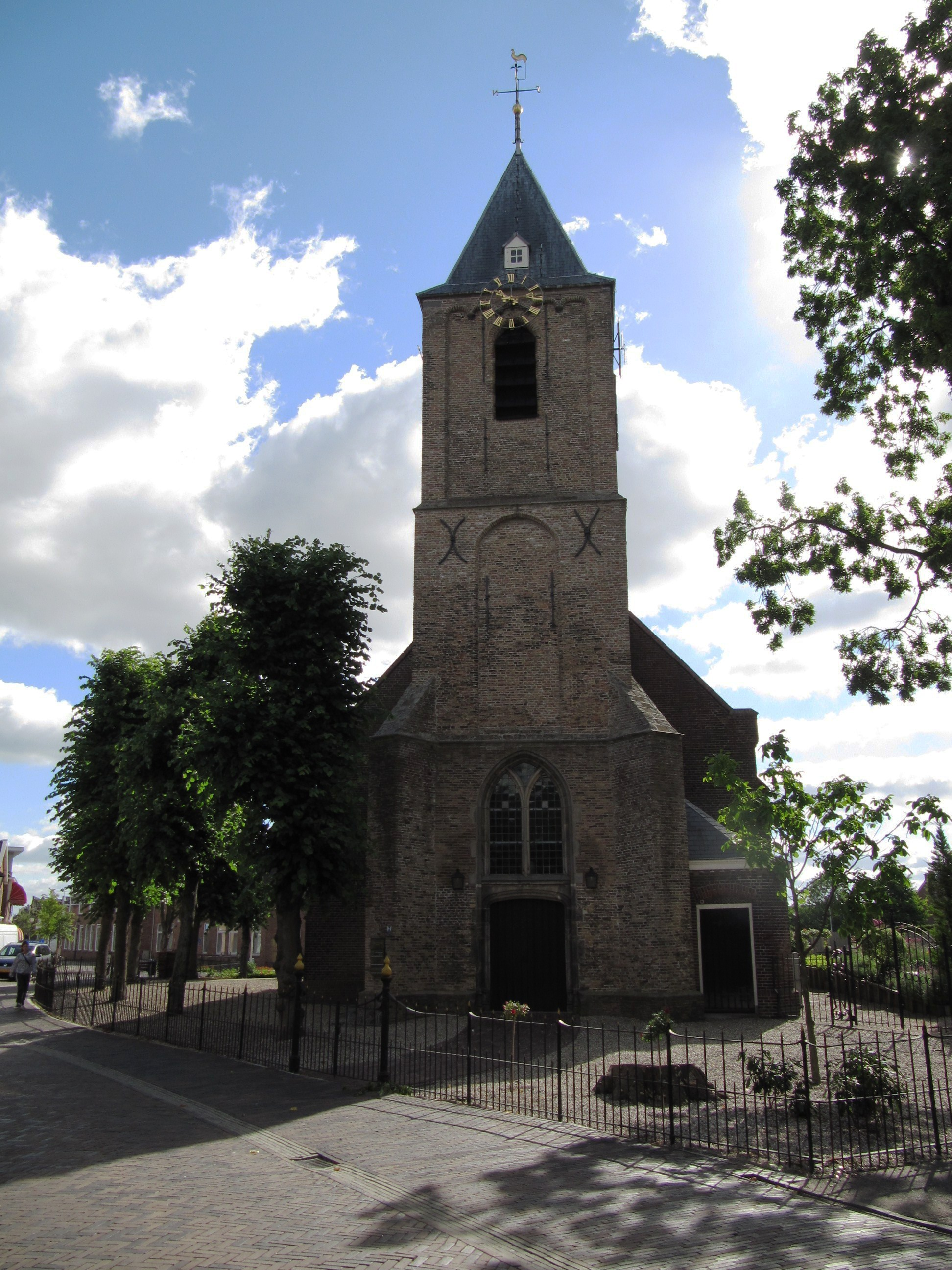 Nootdorp - Dorpsstraat 36 (toren).jpg, rijksmonument